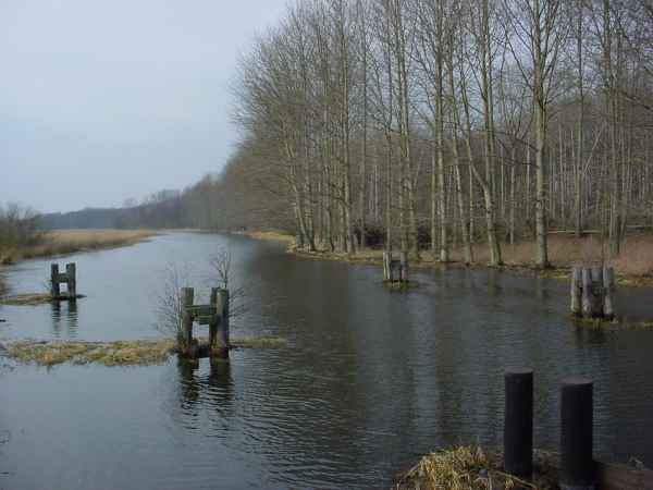 Trebel bei Nehringen Fotografiert Januar 2004 Fotograf: Reinhard Kraasch Copyright Status: GNU Freie Dokumentationslizenz